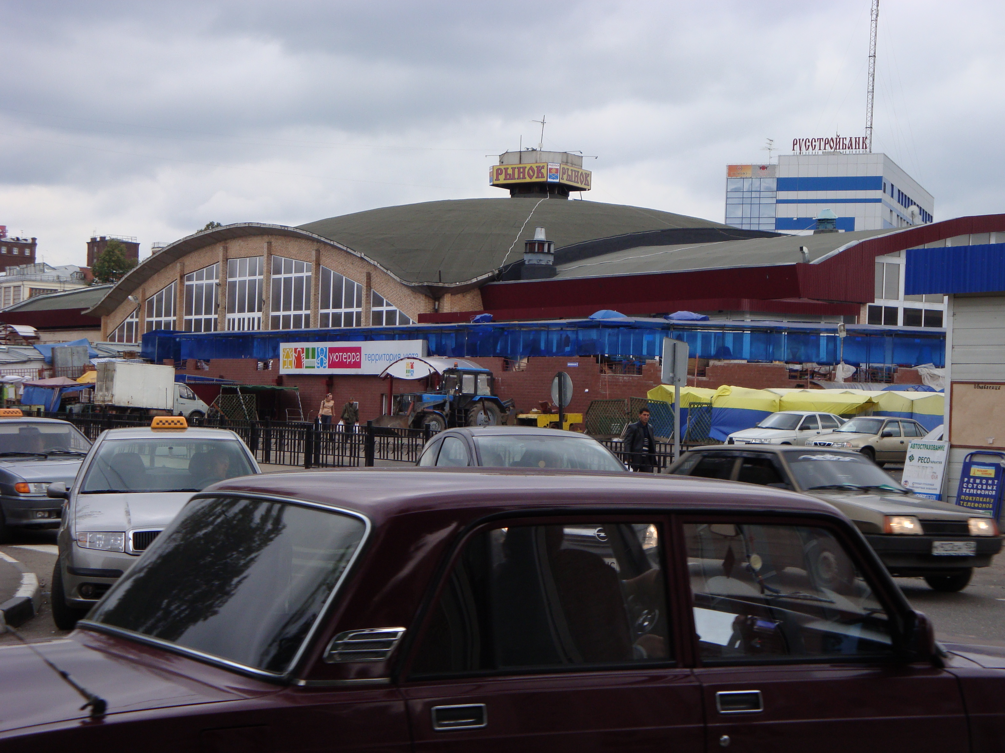 Центральный рынок в Подольске